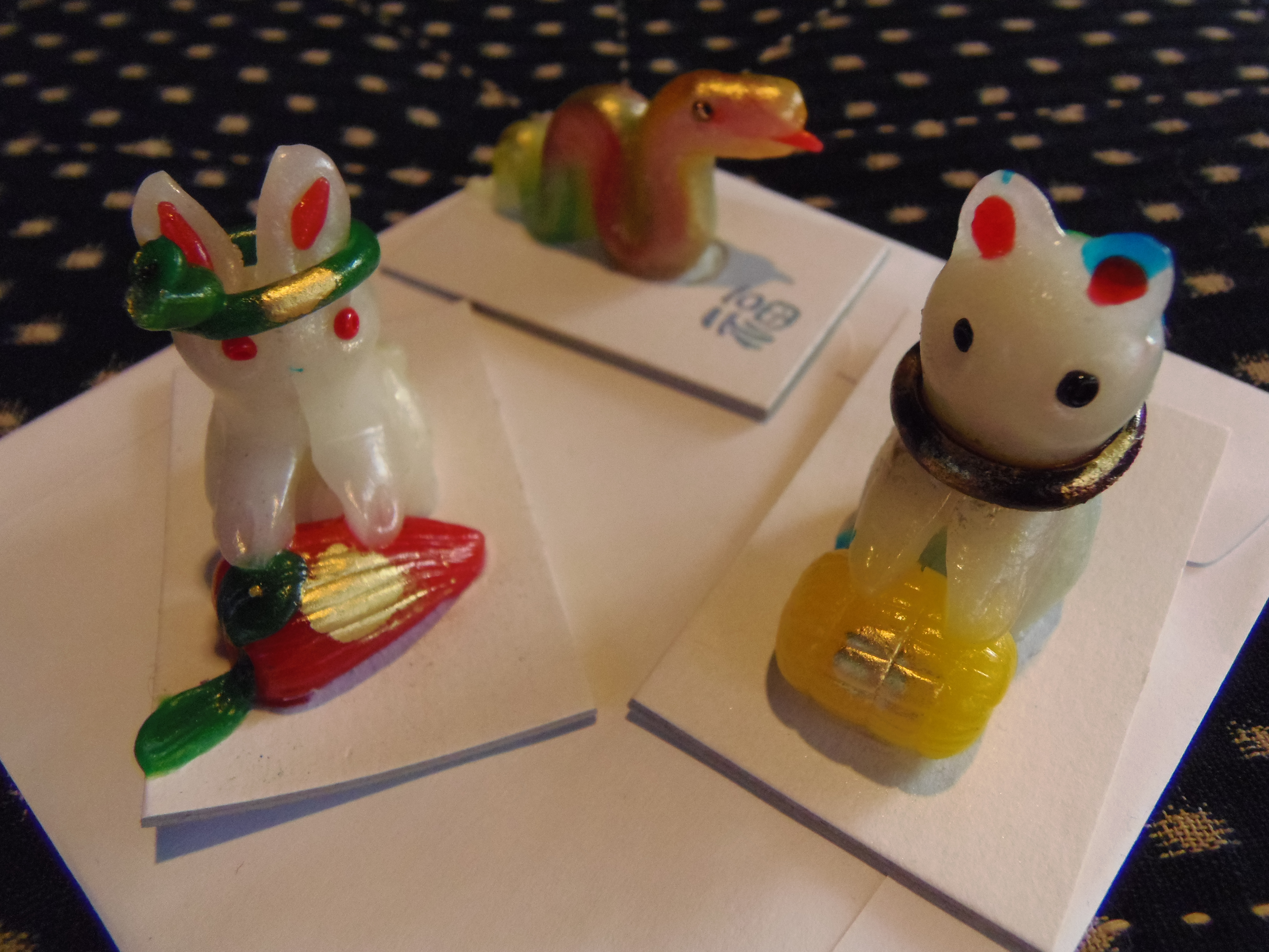 シンコ細工「チンコロ」（左から。人参と兎、干支の蛇、俵と鼠）